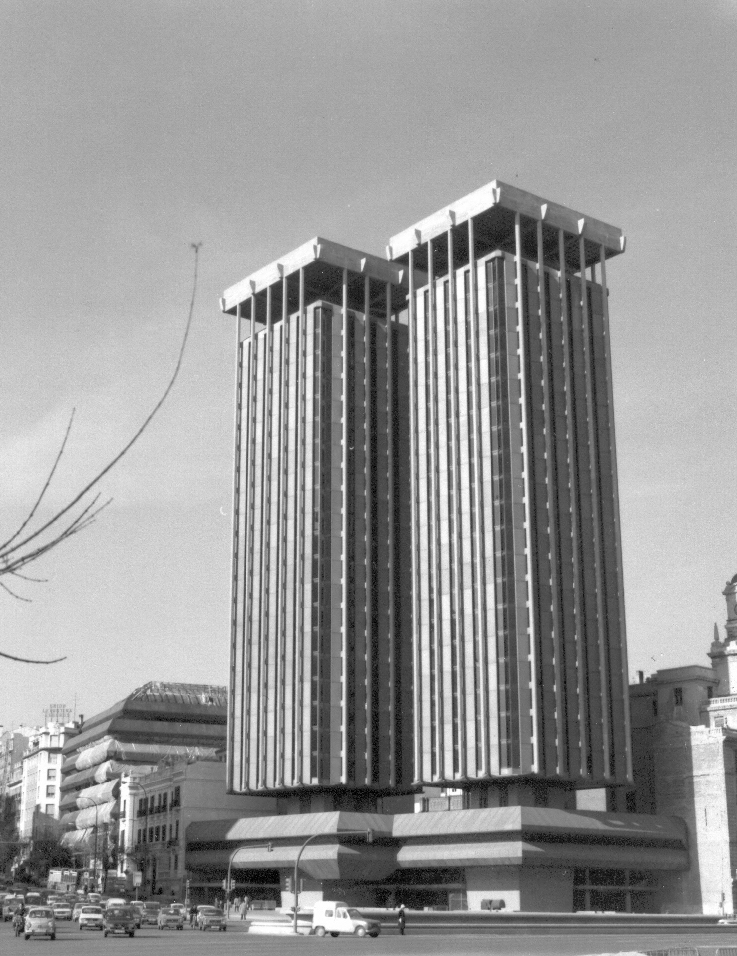 Antonio Lamela. Torres de Colón en Madrid. En su estado original previo a la modificación de los años 90.